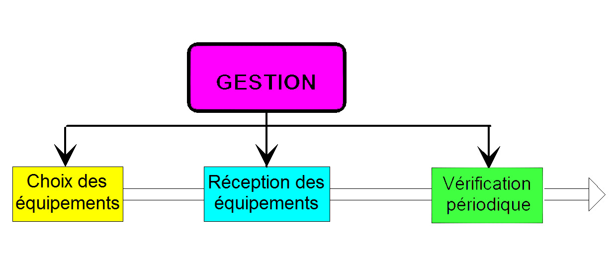 Gestion des appareils de mesure.